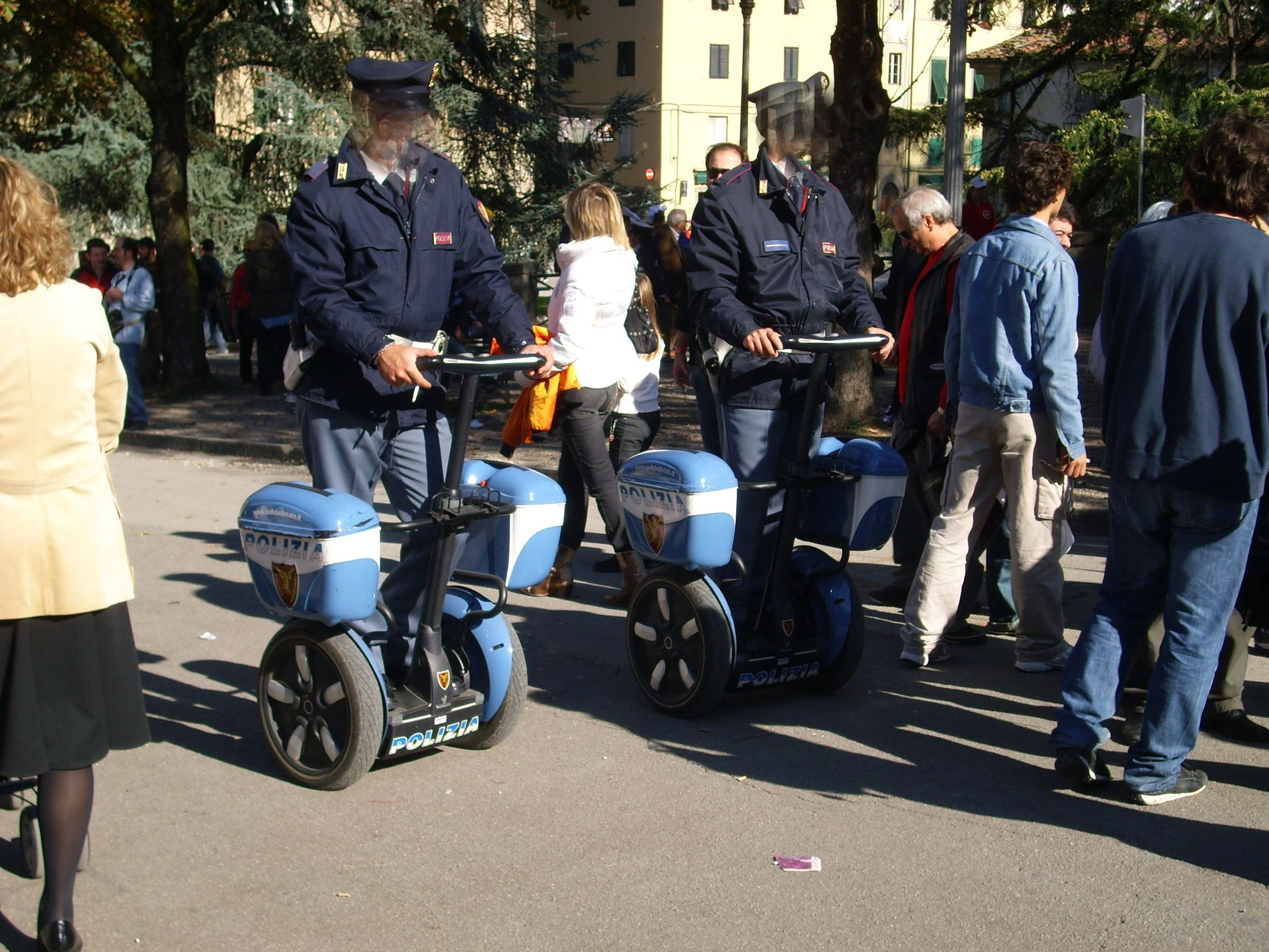 Il Segway Human Transporter, conosciuto anche come "Ginger", in dotazione alla Polizia di Stato italiana. Il viso degli agenti è oscurato per motivi di privacy.